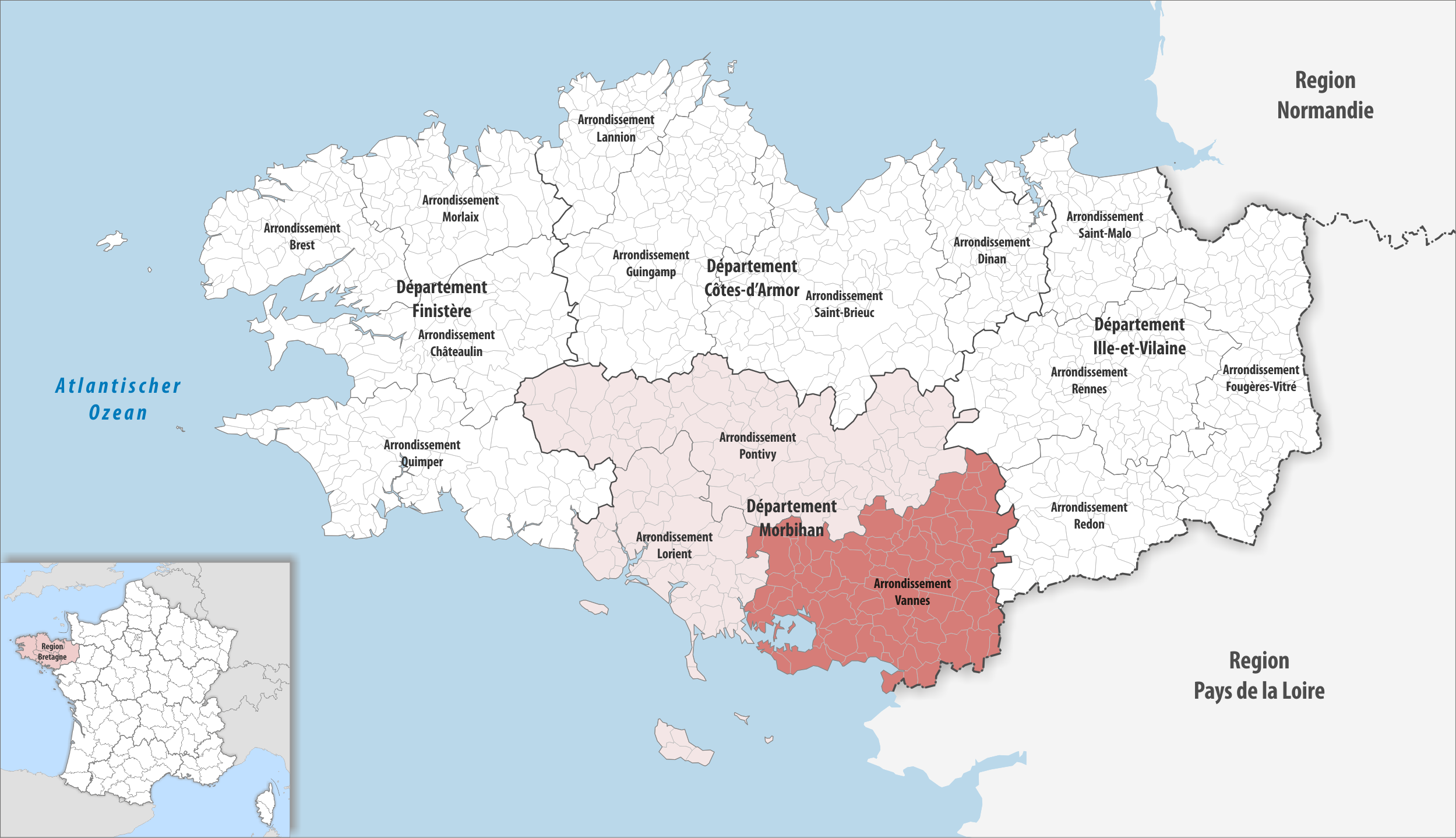 Lage des Arrondissements Vannes